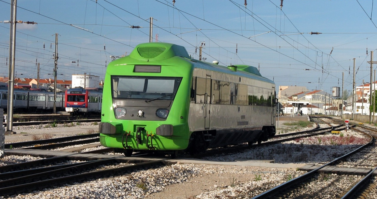 04 / Abr / 2009